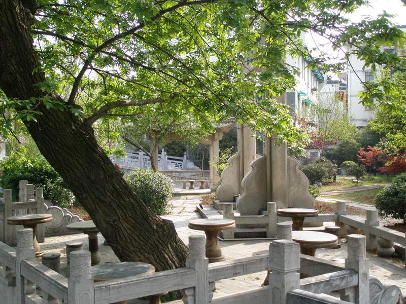 南京桃叶渡